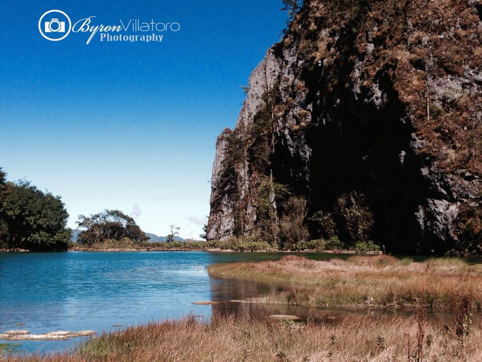 Area protegida en Huehuetenango